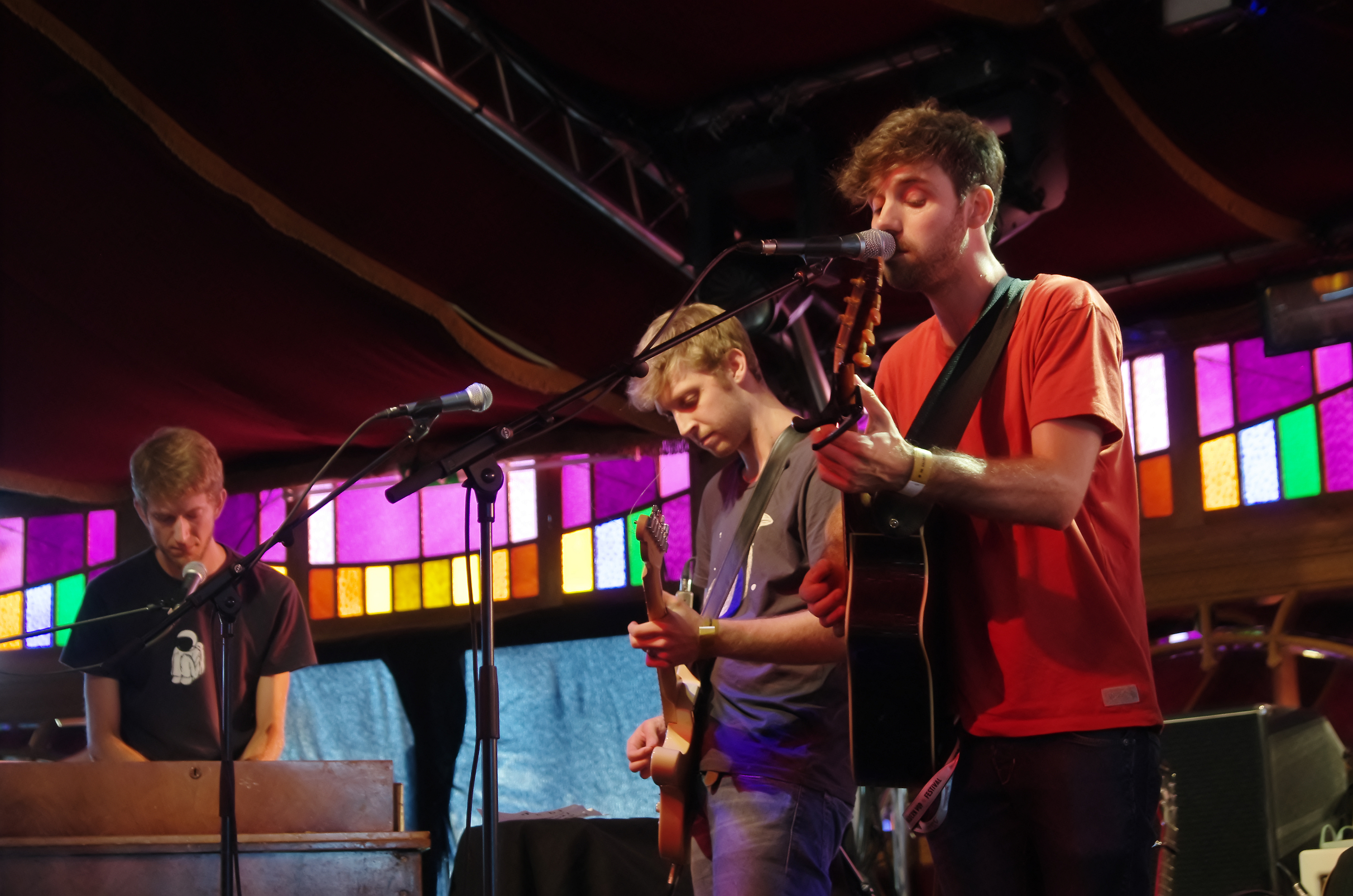 Florian Ostertag und Band auf dem 30. Haldern Pop Festival 2013